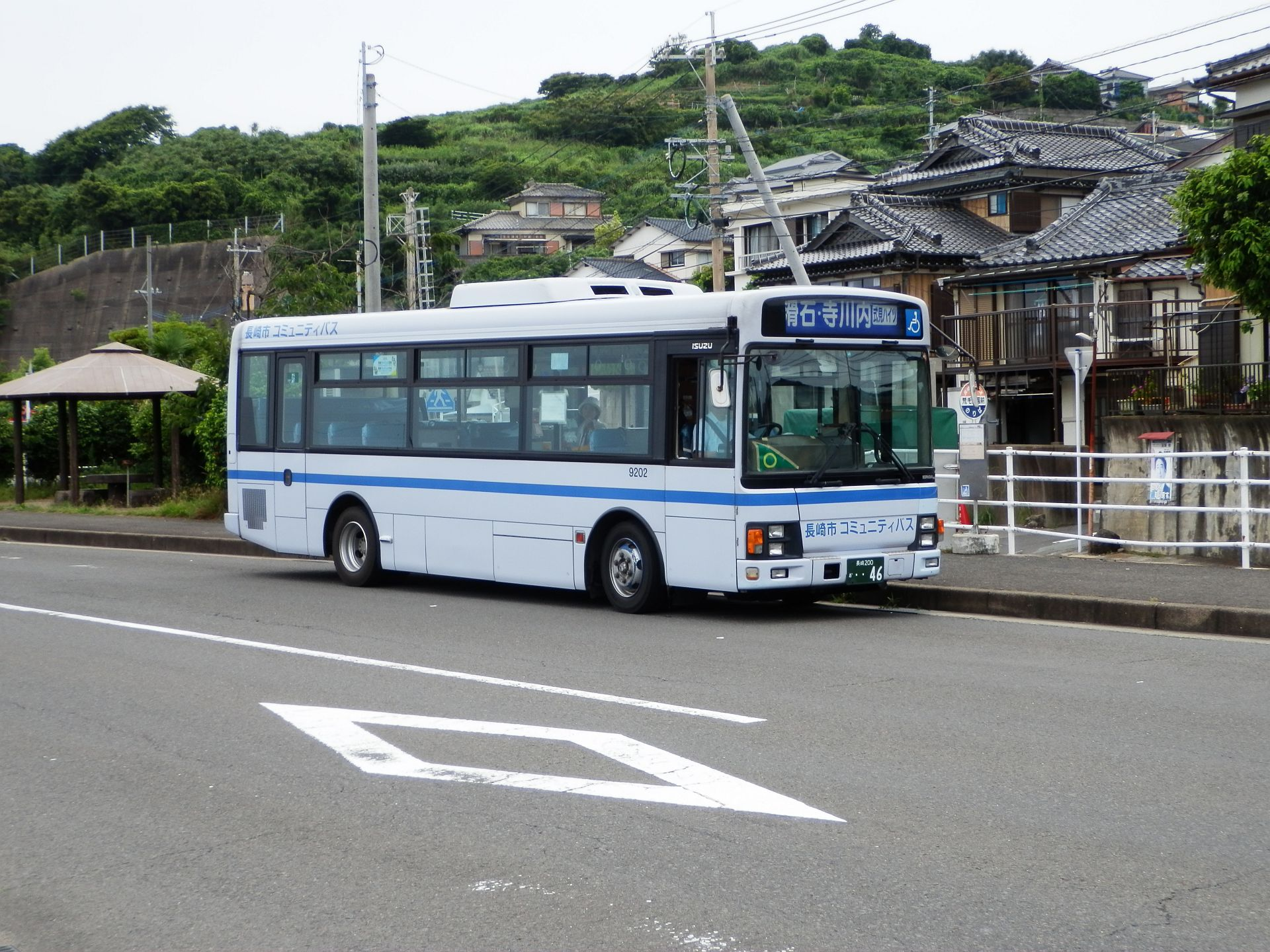 長崎市コミュニティバス（長崎バス運行） 9202号